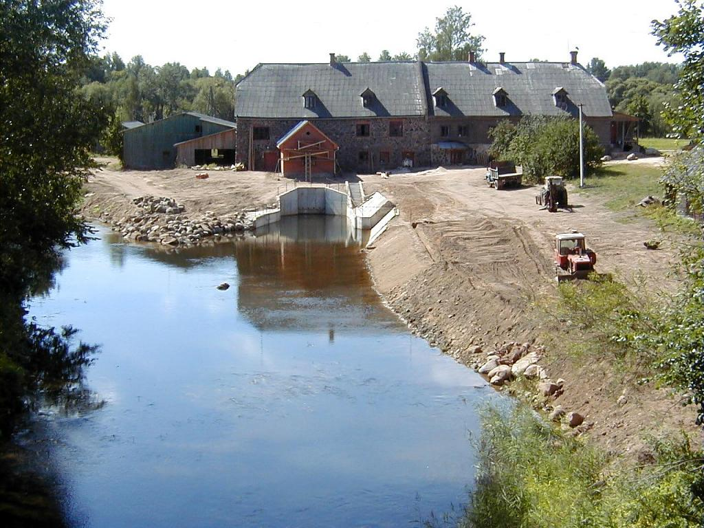 Sinoles ūdensdzirnavas 2002-08-10